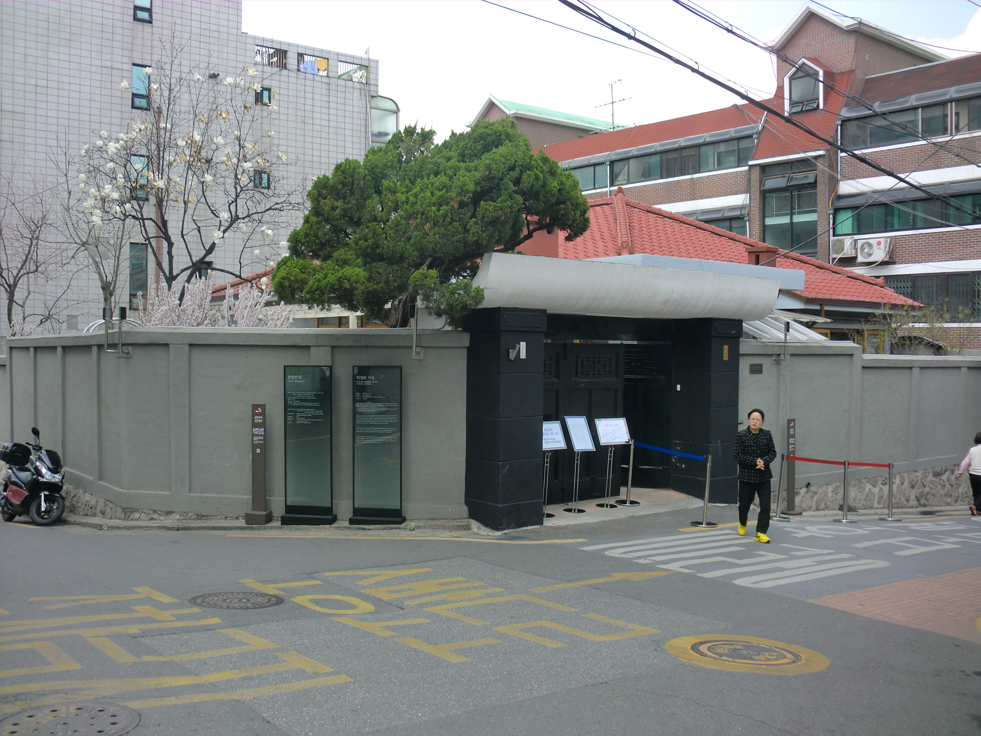 서울특별시 중구에 있는 박정희가옥